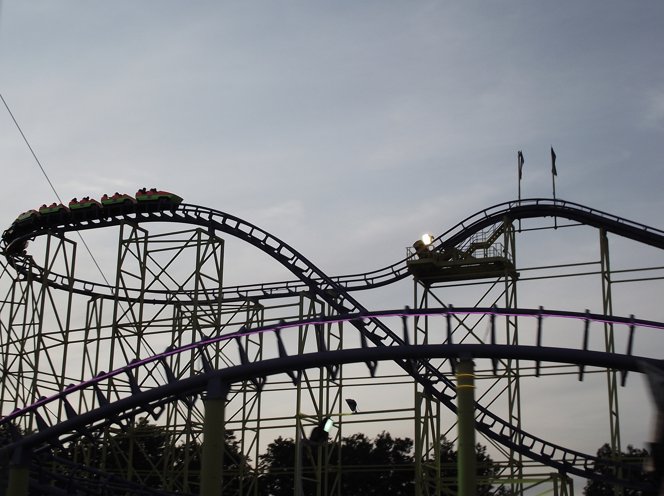 Euroloop Europark 2